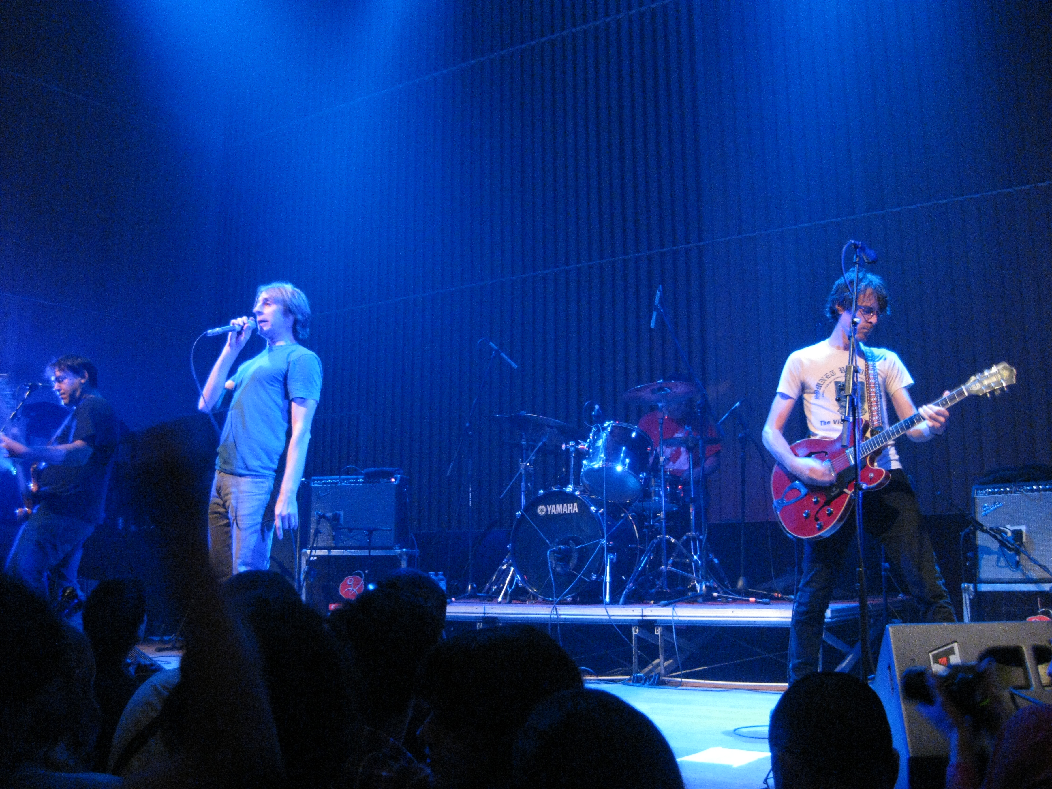 Mudhoney en directo na sala Capitol de Santiago de Compostela.